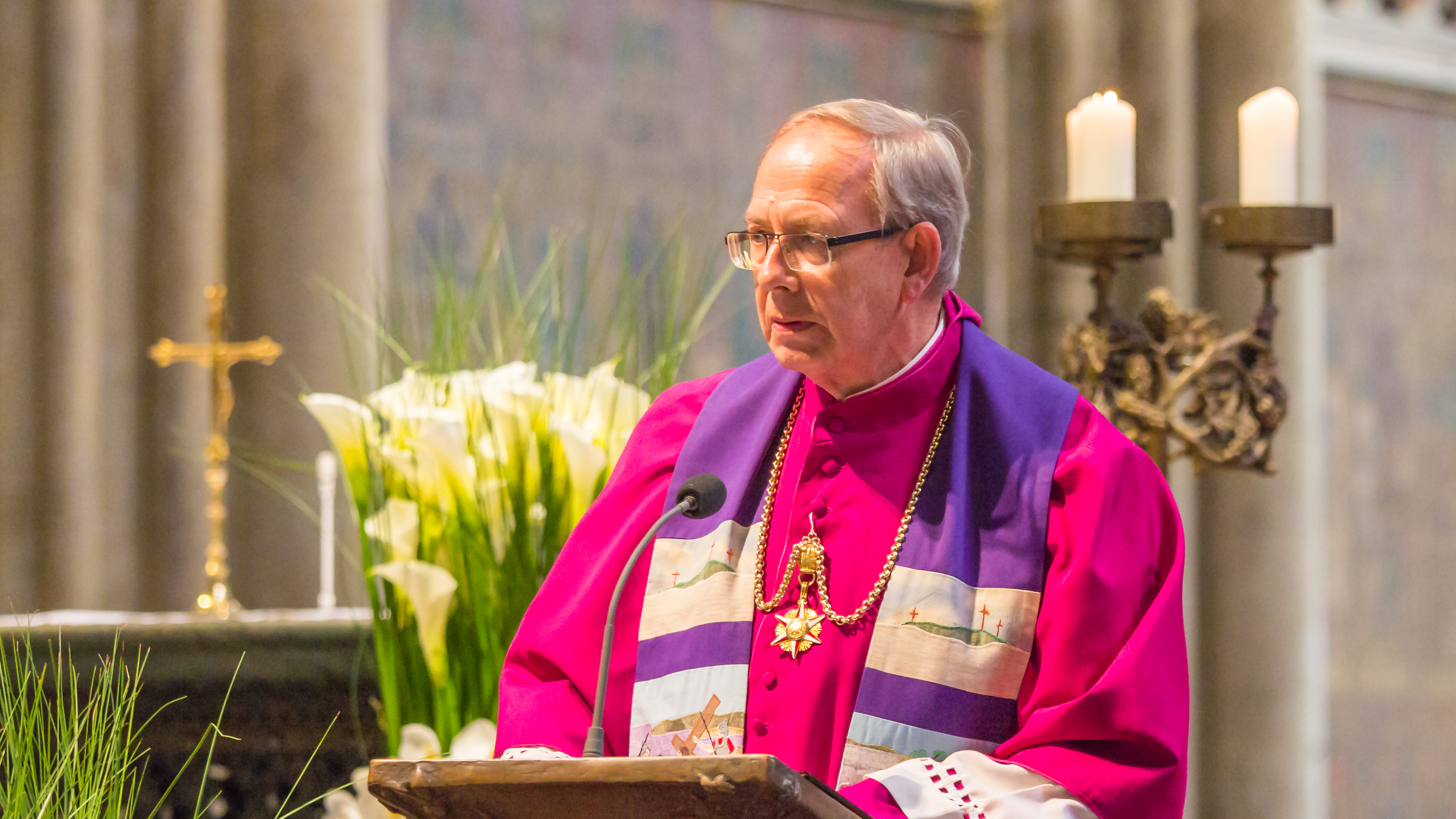 Trauerfeier für den Kölner Verleger Alfred Neven DuMont im Kölner Dom Gebet durch Dompropst em. Norbert Feldhoff